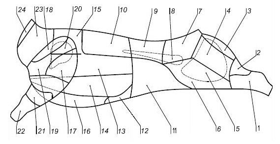 1, 22. զինգեր; 2-7. կոնքազդրային կտոր; 9-10. գավակ և սուկի; 11-12. փորամիս; 13-14. լանջանիս; 15. մնդավ; 16-20. երբուծ; 20. ճնաղ; 23-24. վիզ